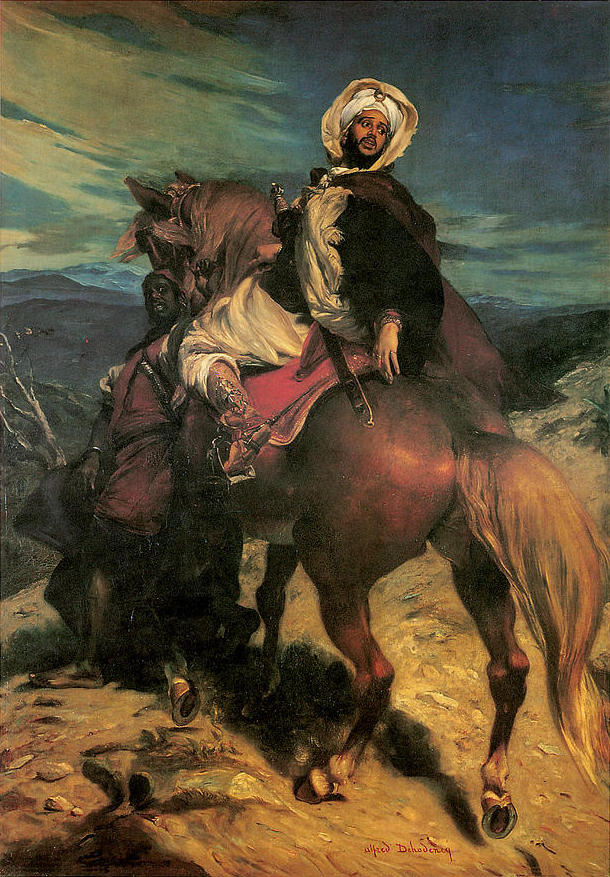 Boabdil el Chico por Alfred Dehodencq (1822-1882).